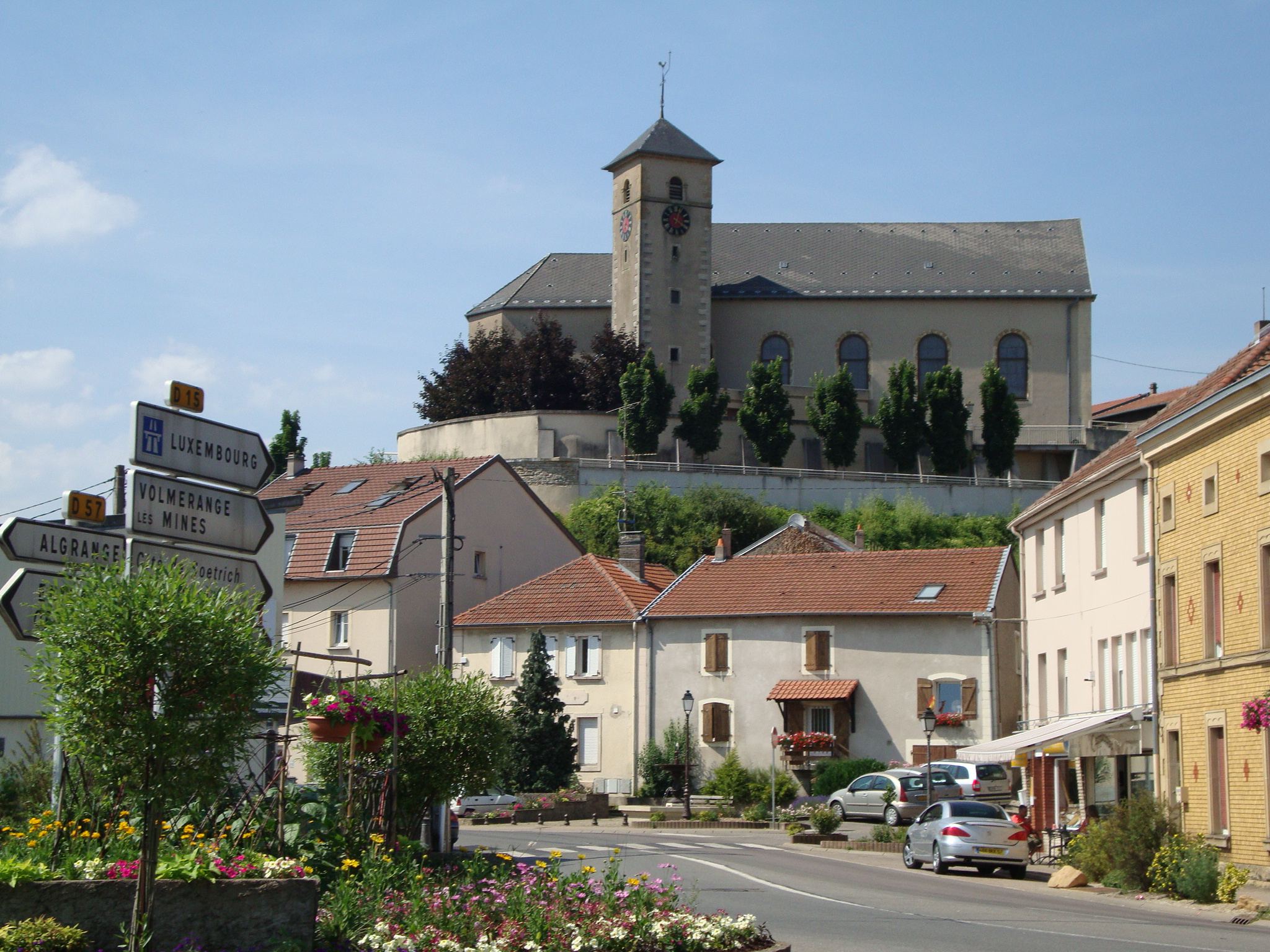 Église Saint-Étienne d'Hettange-Grande (57)